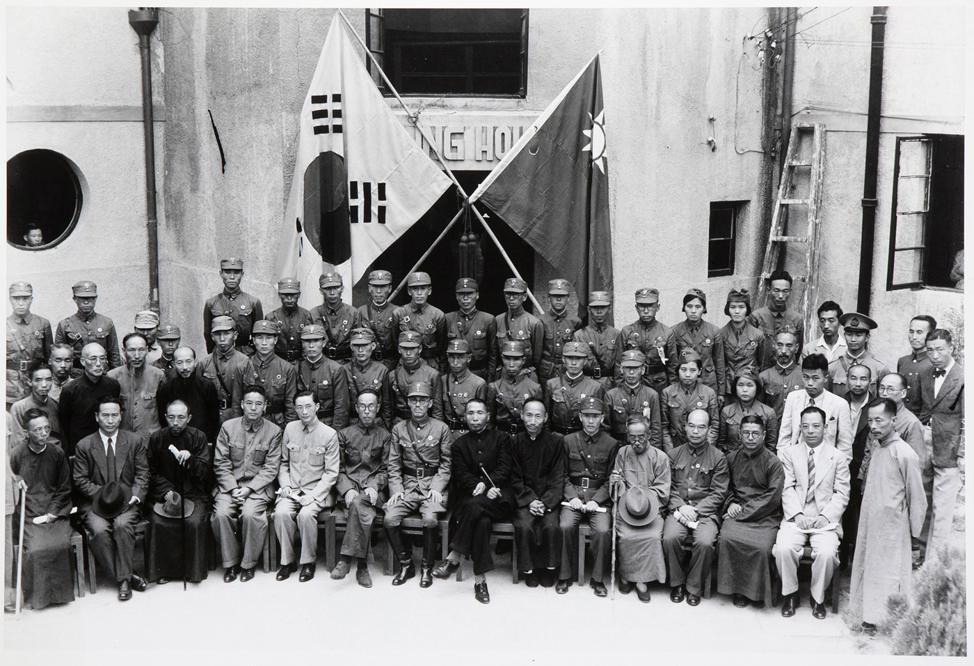 重慶的韓國光復軍官兵，與國民革命軍穿同一種軍裝，但帽徽不同。